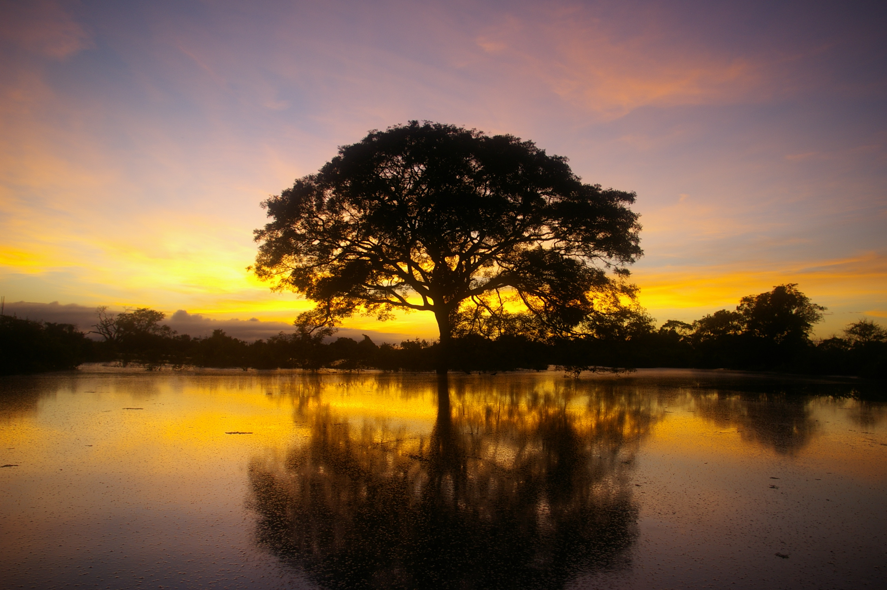 Amazon river in Bolivia.